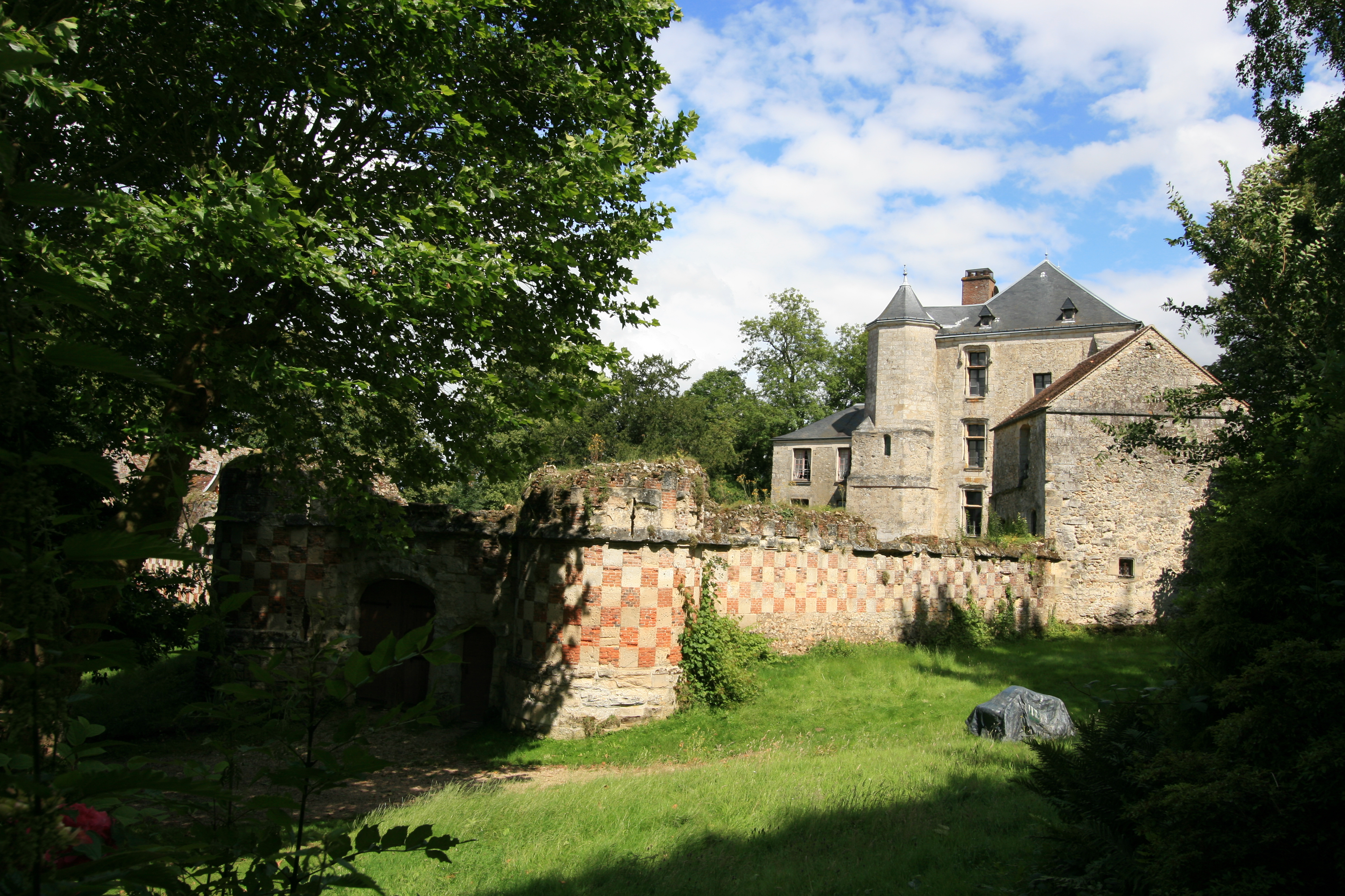 Chateau d'Arthies, Val d'Oise, France.